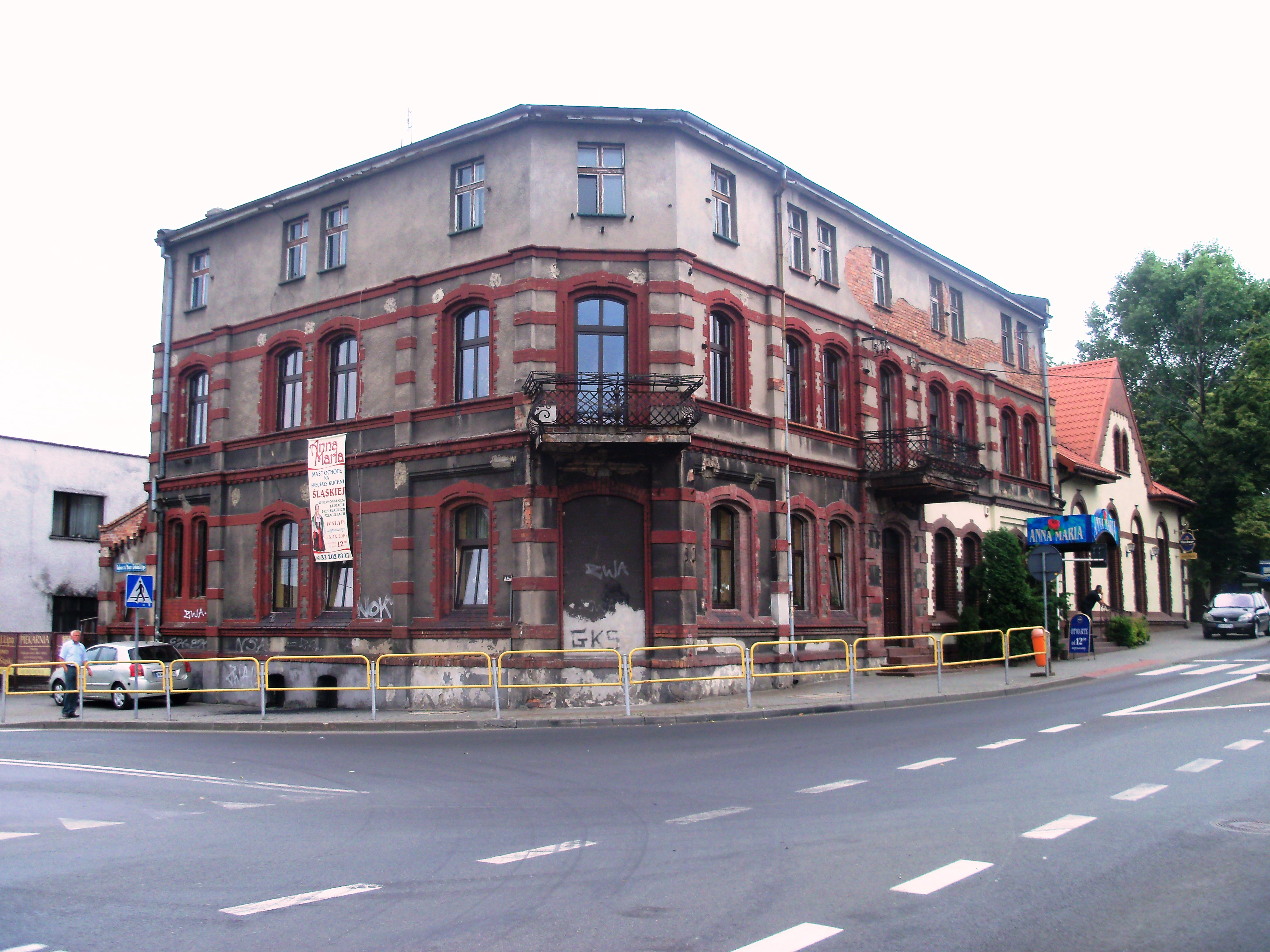 Ulica Szarych Szeregów w Katowicach-Kostuchnie - dawny Urząd Miasta Kostuchna